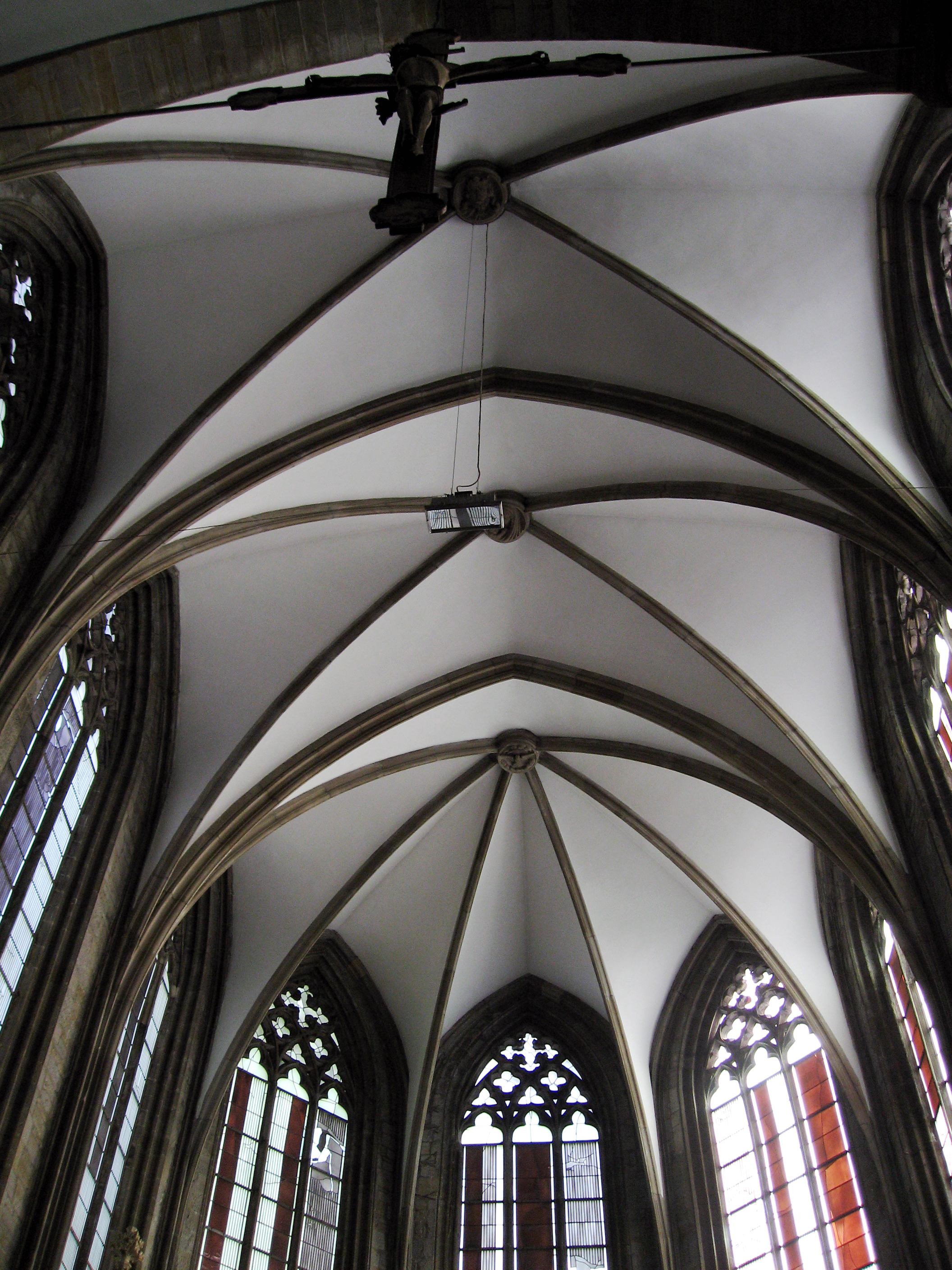 Dortmund, Marienkirche, Deckengewölbe gotischer Chor mit Kreuz